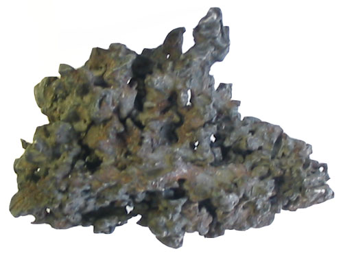 Oksüdeerunud pinnaga eheda vase tükk